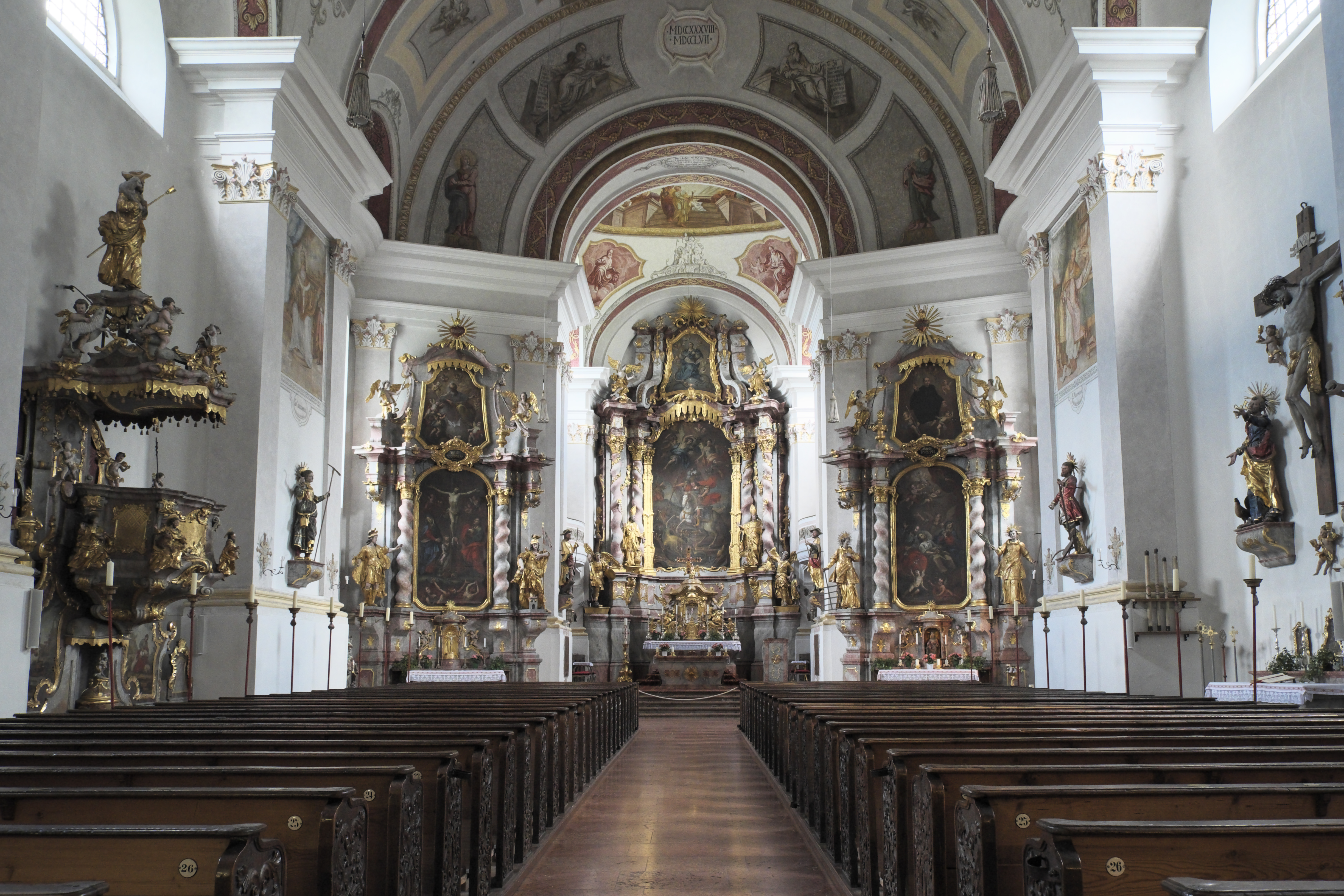 Katholische Pfarrkirche St. Georg in Ruhpolding im Landkreis Traunstein (Bayern/Deutschland), Innenraum